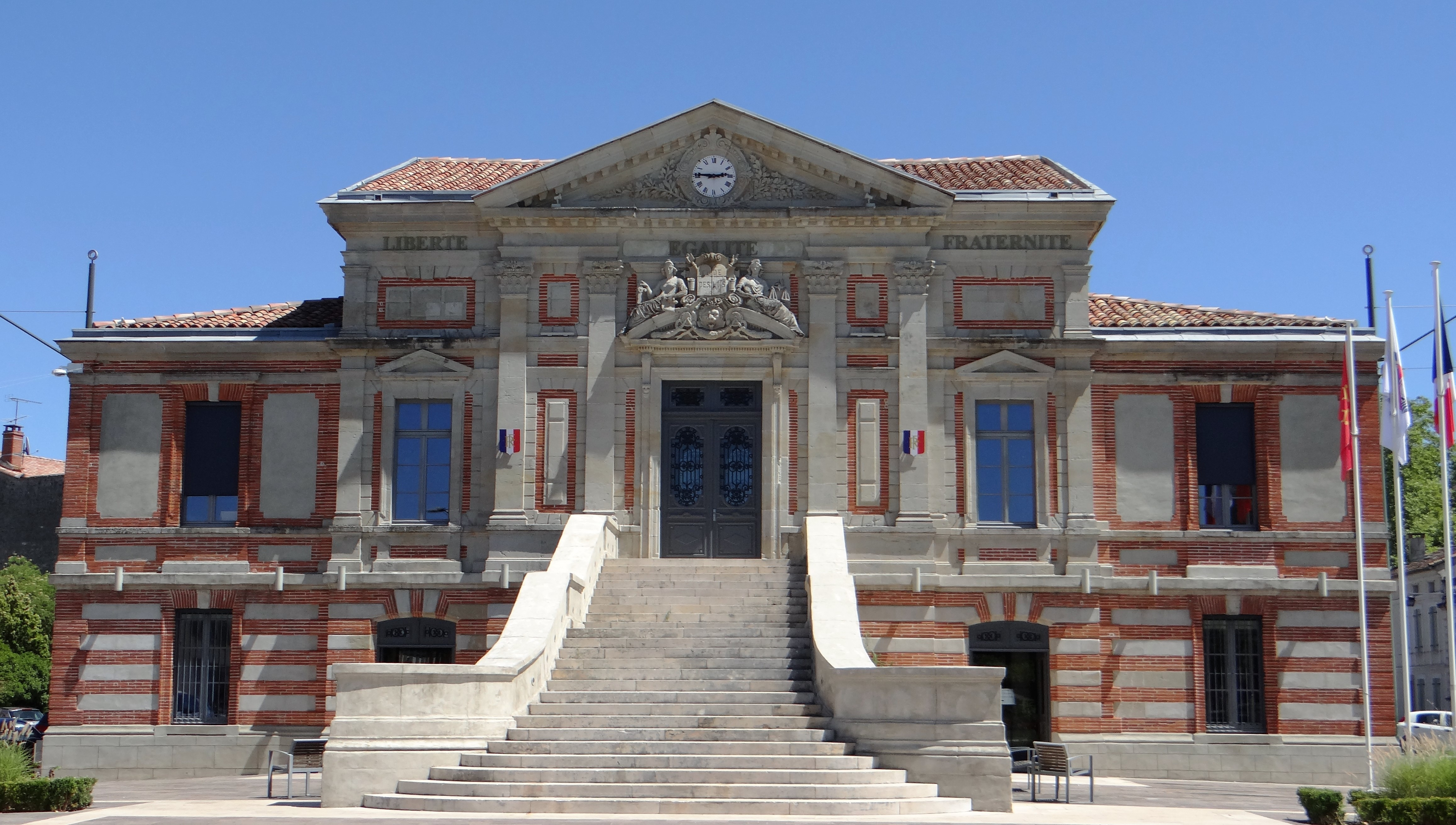 Lavaur (Tarn) - Hôtel de ville (ancien tribunal)